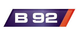 Neues Logo von B92